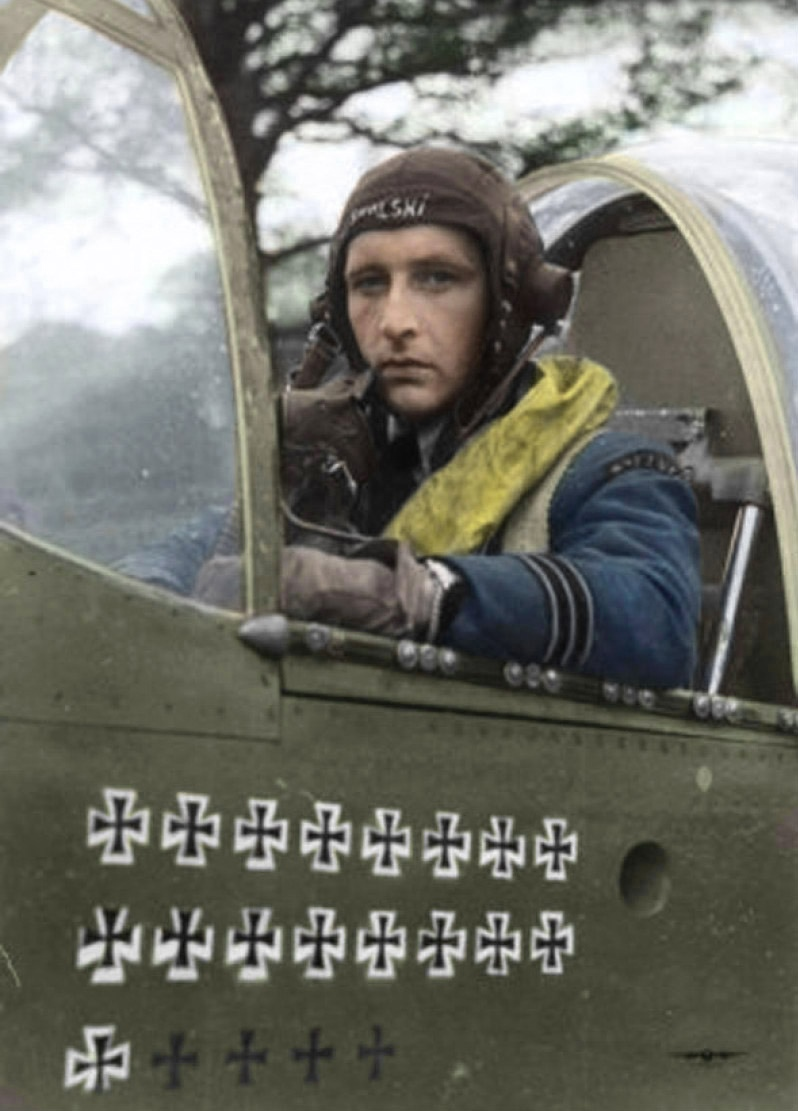 Stanisław Skalski, zdjęcie z czasów II WŚ